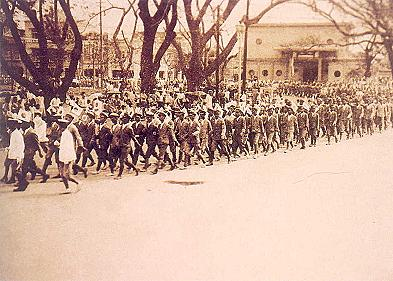 1940年代臺南市歷史館